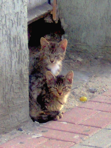 Autor: Krzysztof